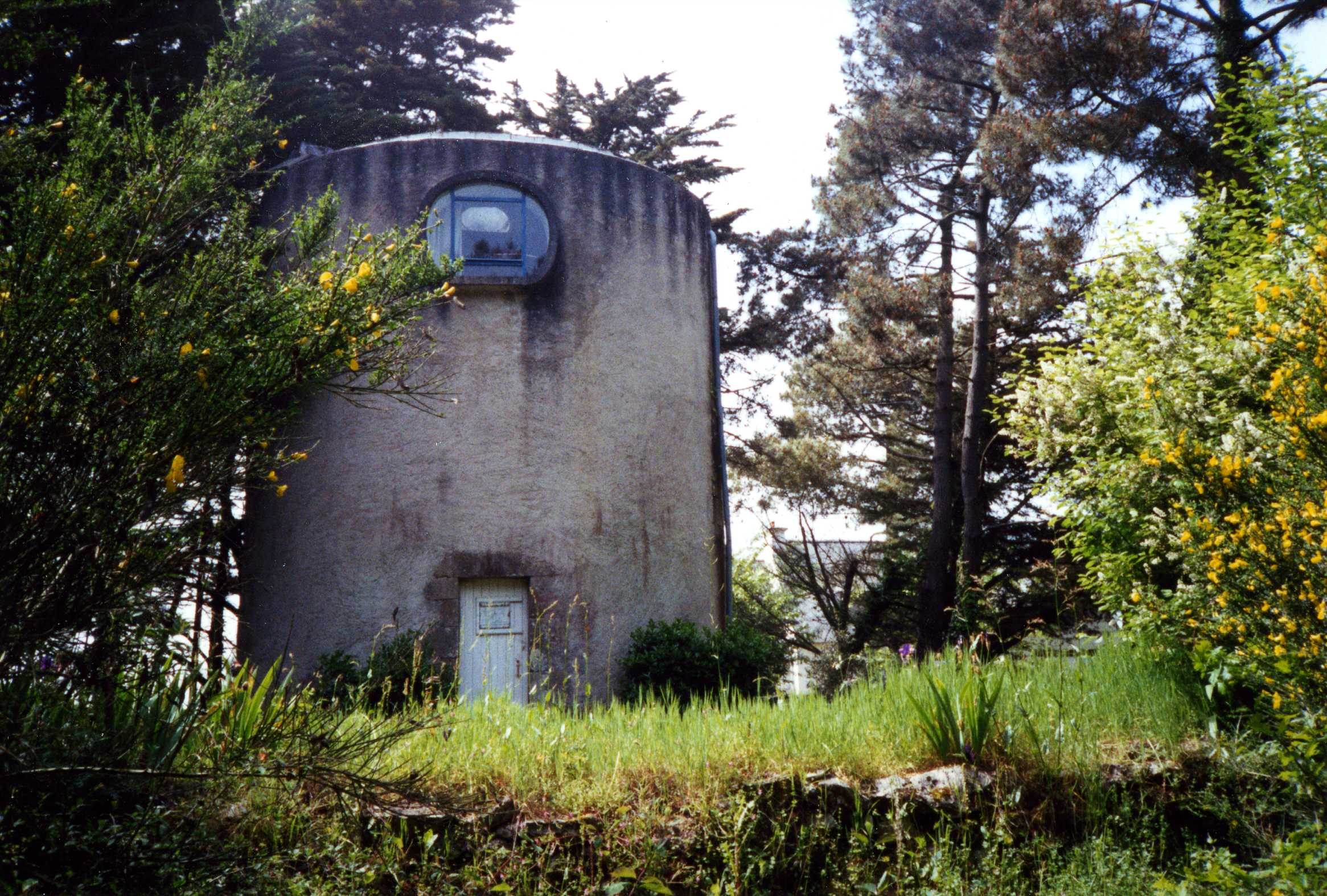 Moulin acquis dans les années 1930 et rénové par le peintre français Jean Le Moal à Larmor-Baden en Bretagne (France).